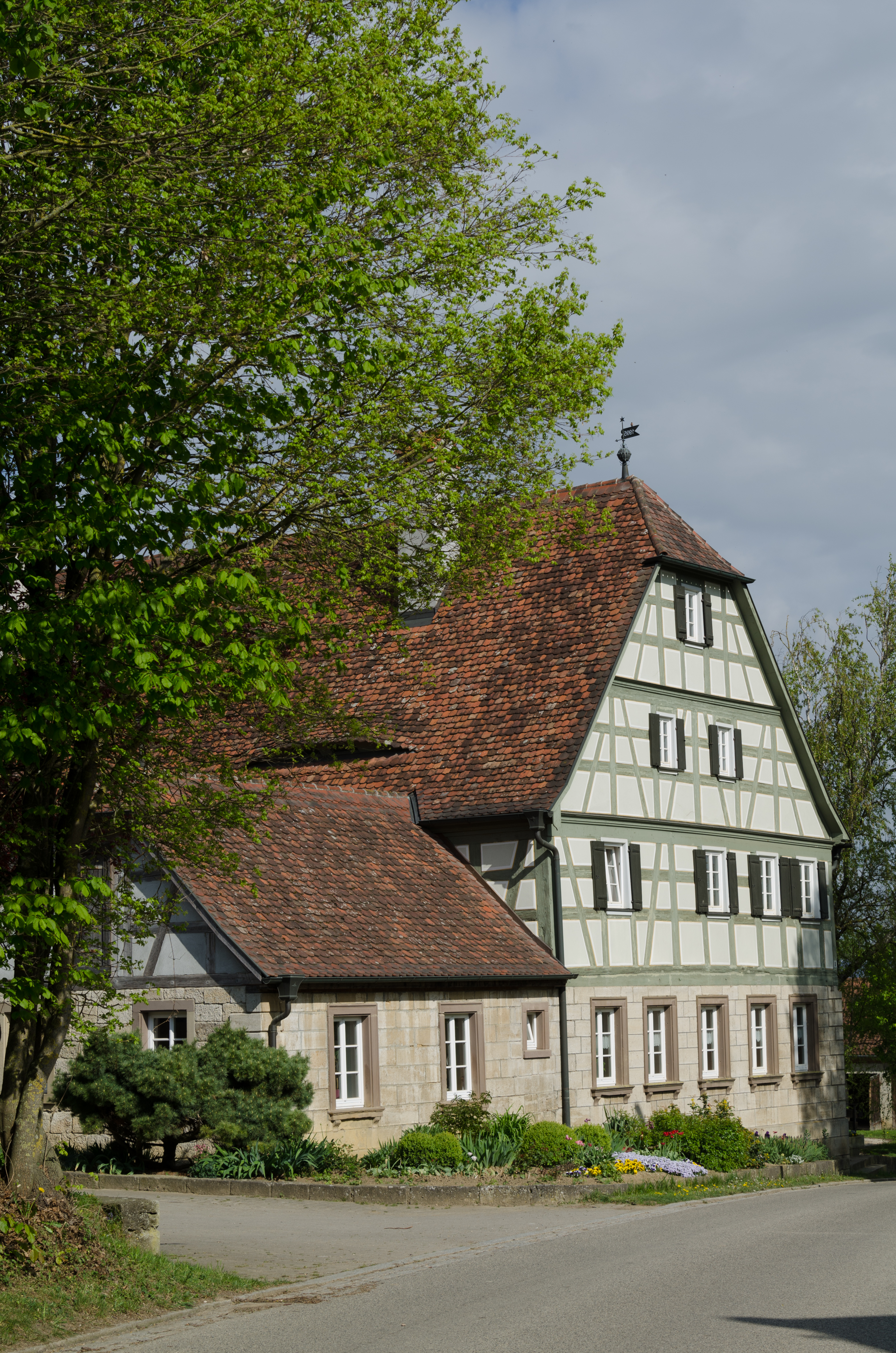 Adelshofen, Großharbach 8